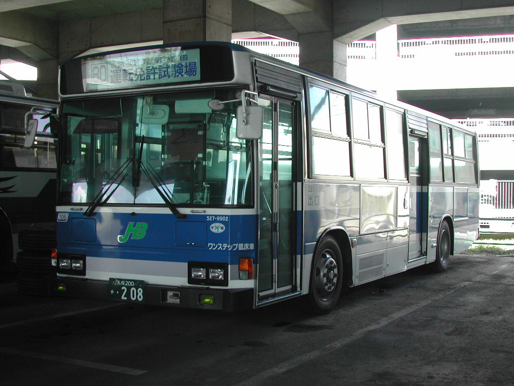 80 運転免許試験場行 札幌営業所にて、許可を得て撮影